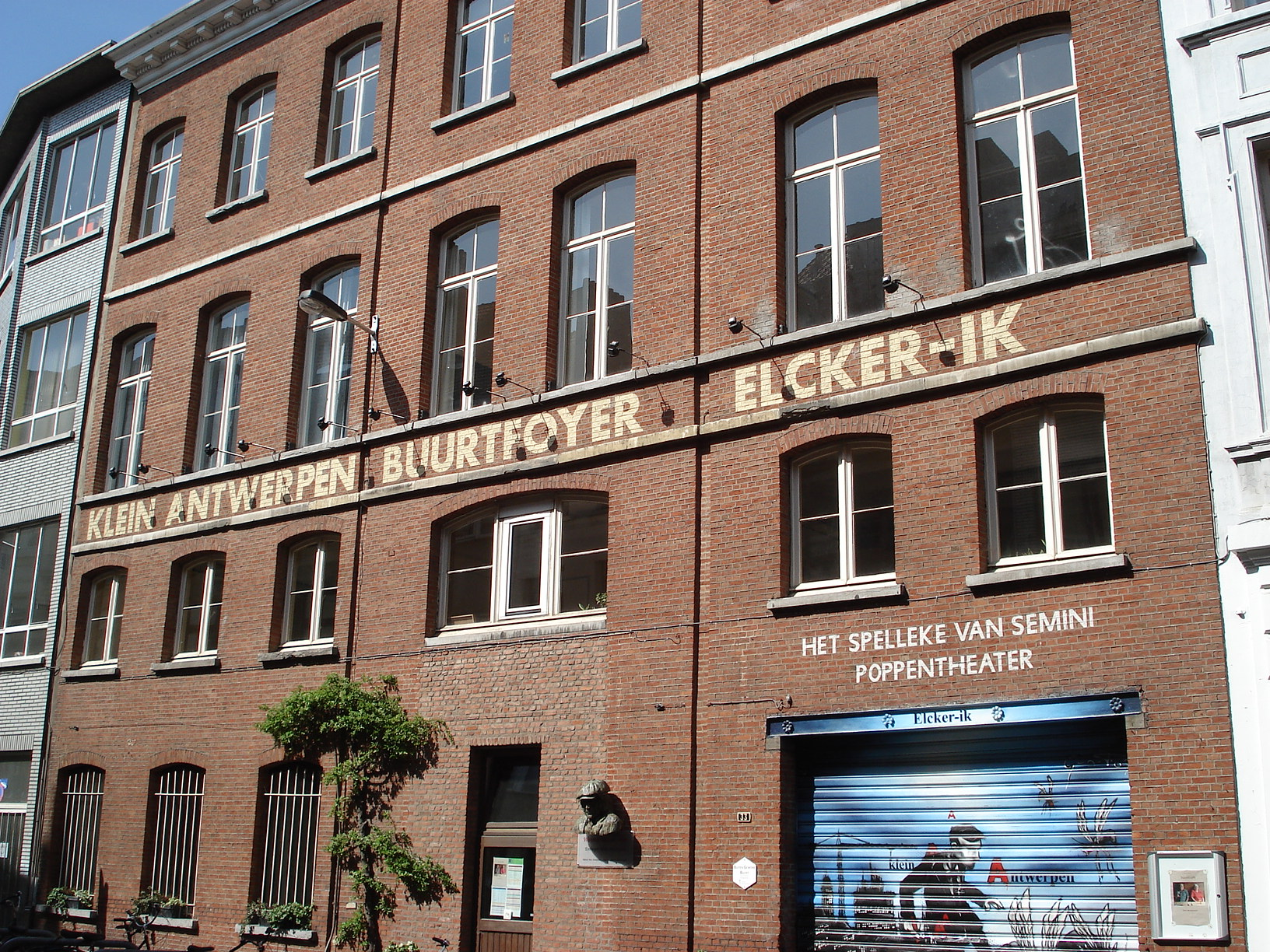 Antwerpen, België. Buurthuis Elcker-Ick in wijk Klein-Antwerpen, met in het midden onderaan buste van zanger Wannes Van de Velde (beeldhouwer Michael Bracke; opgesteld 2009).